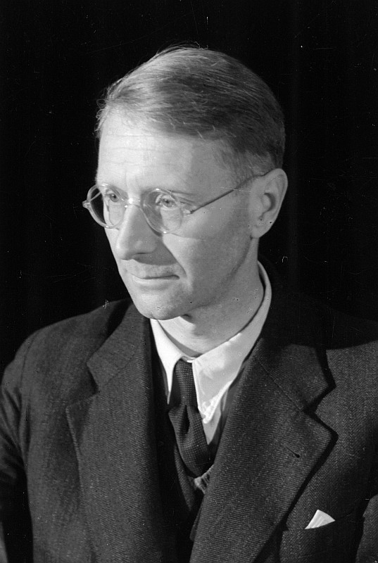 Original image description from the Deutsche Fotothek Porträt